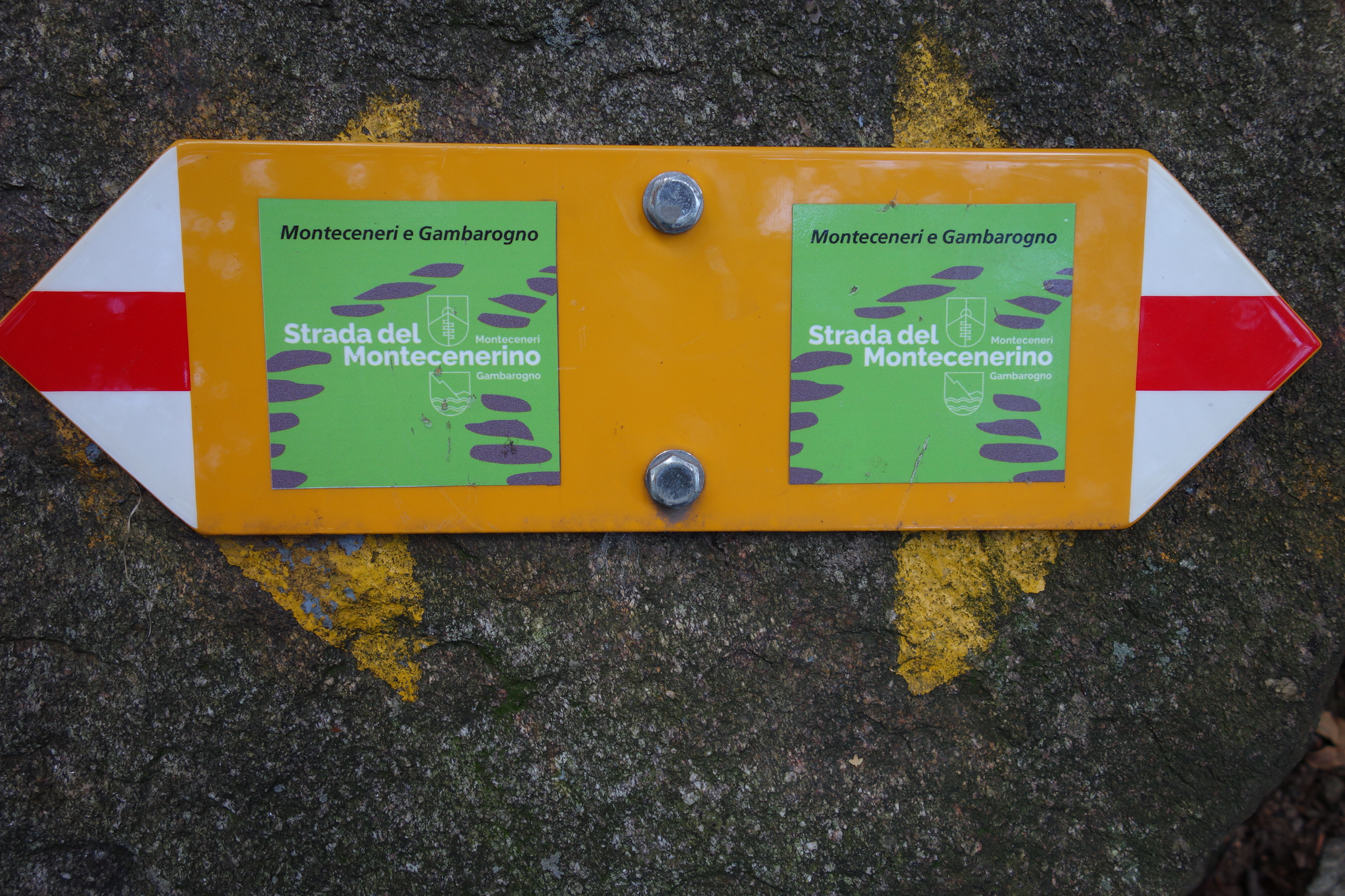 Via Montecenerino, Monte Ceneri TI, Schweiz